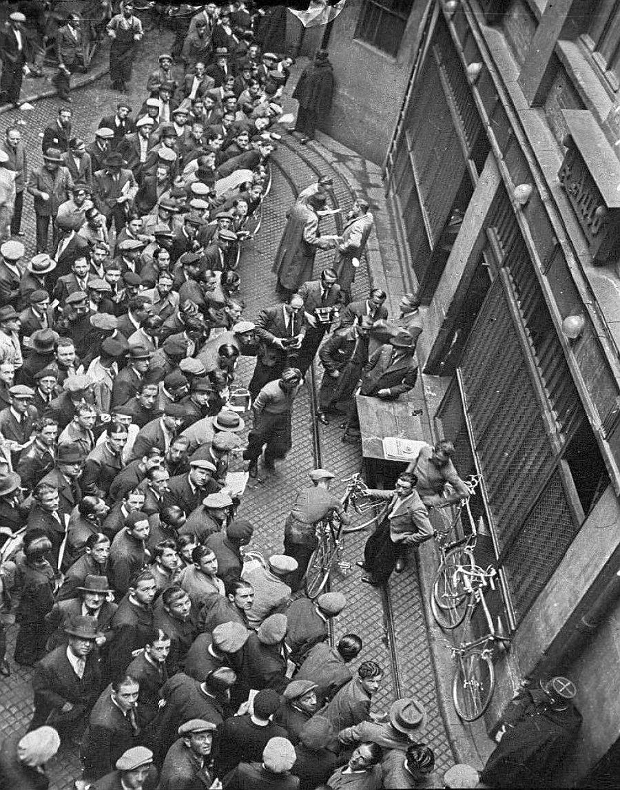 Veille du départ du Tour de France 1937, le 29 juillet au siège de 'L'Auto' du 29 faubourg Montmartre - présentation des équipes, pointages, règlements, autographes à la foule...